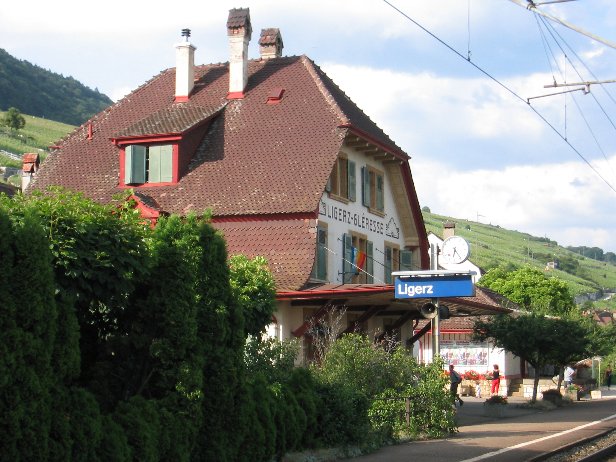 Bahnhof Ligerz